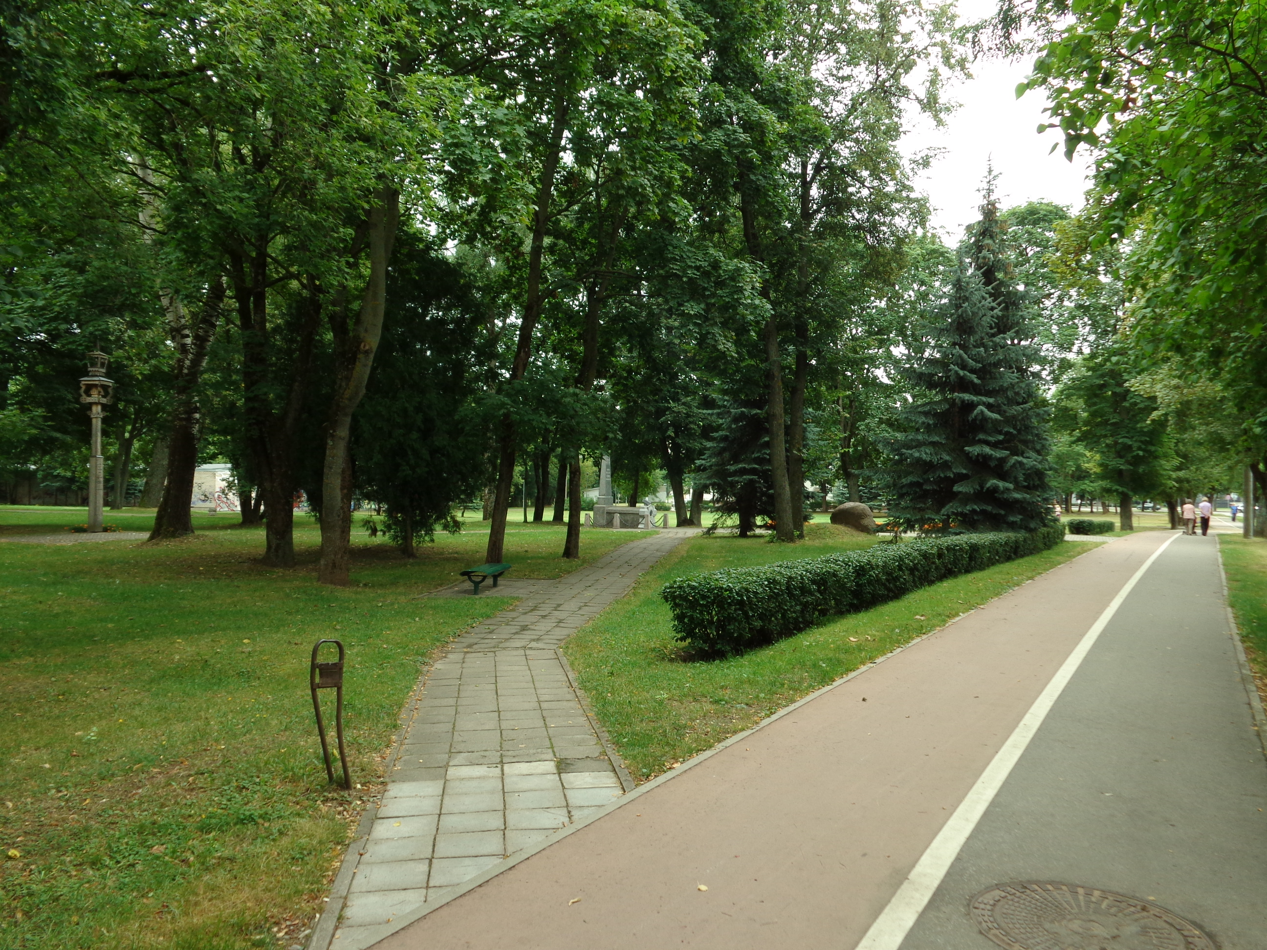 Ramybės Skveras, 2014